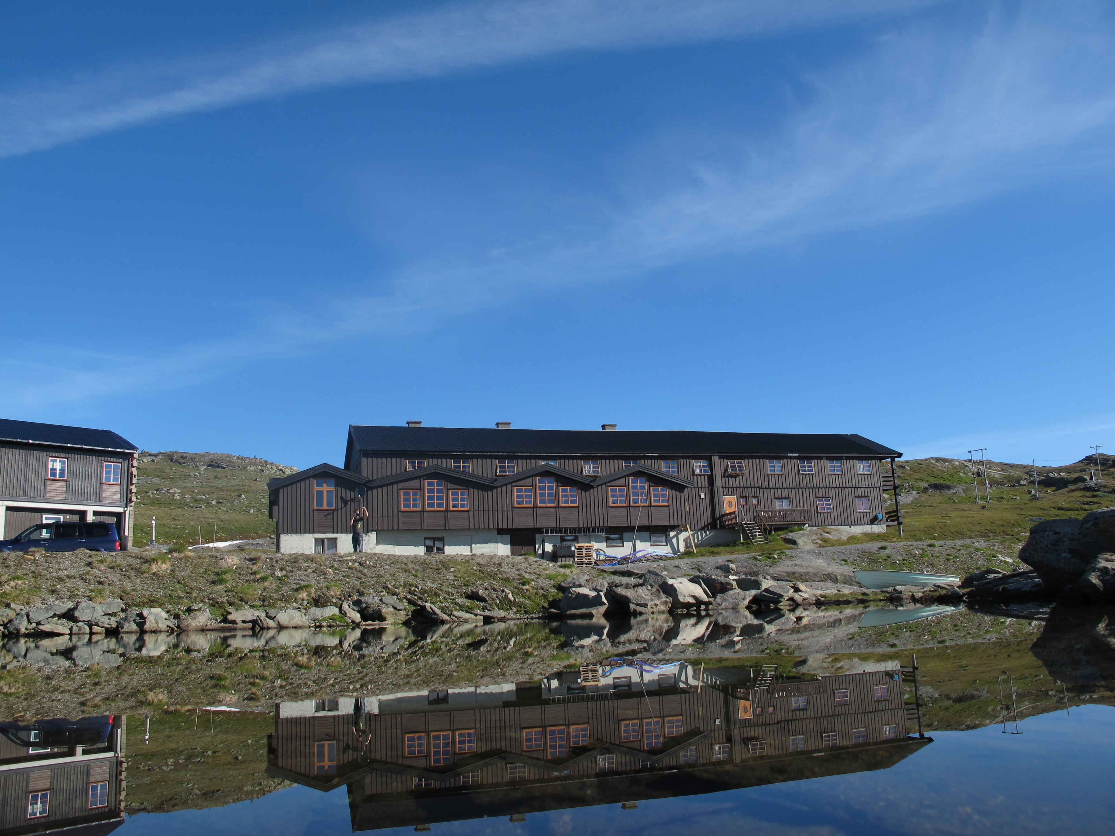 Bilde av Sognefjellshytta fra august 2012 (før det særegne mellombygget ble oppført).